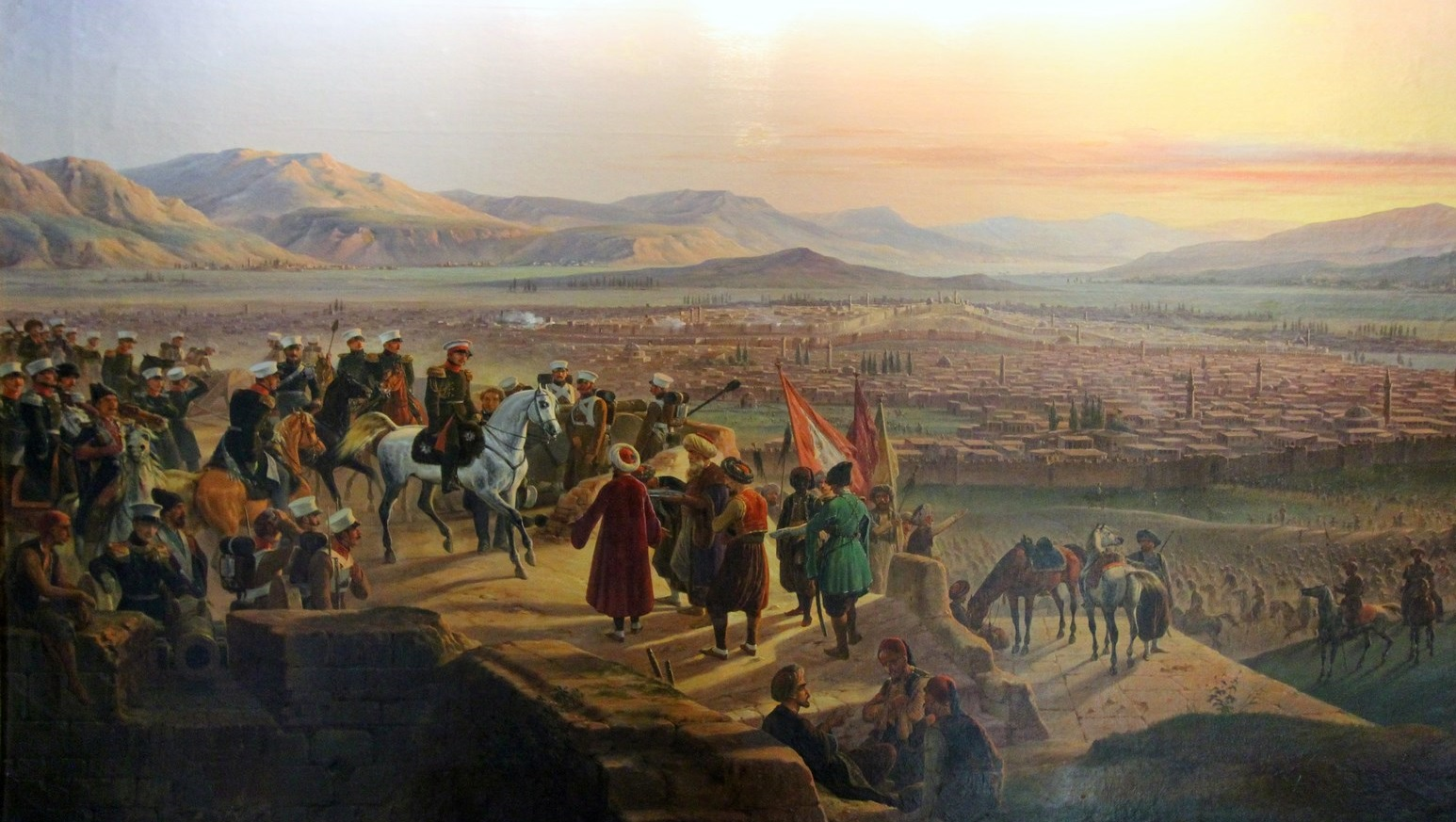 Януарий Суходольский (1797–1875) Сдача крепости Эрзерум 27 июня 1829 года. 1834. Холст, масло